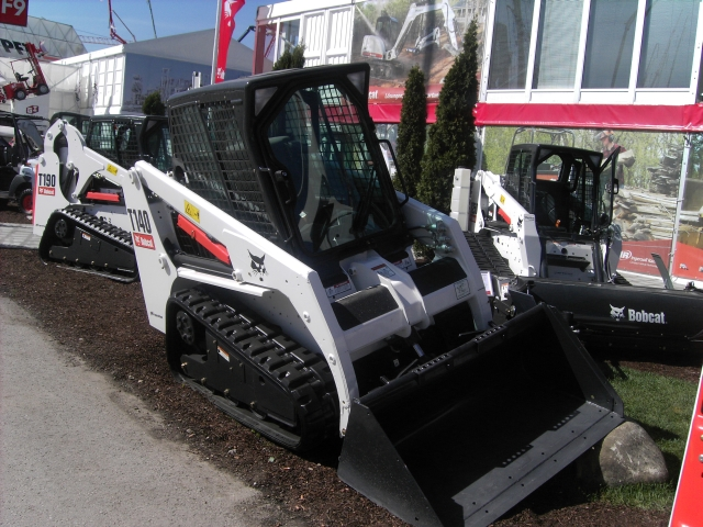 Bobcat-Raupenlader T140